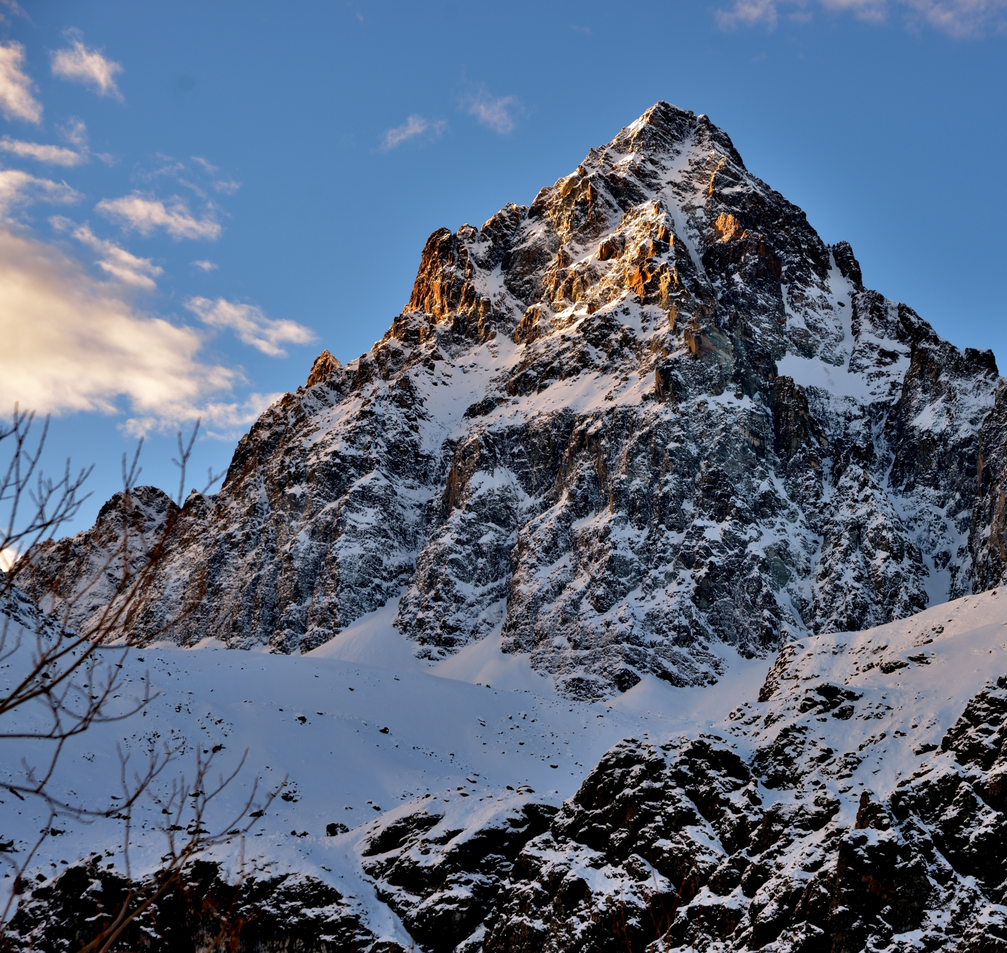 Parco del Monviso (Q47192508)